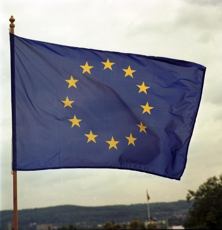 Bonn, Juli 1991 Europa-Flagge Die zwölf gelben Sterne auf blauem Grund stehen sinnbildlich für die Mitgliedstaaten der europäischen Gemeinschaft (EG). Der EG gehören an: Belgien, Bundesrepublik Deutschland, Dänemark, Griechenland, Großbritannien, Frankreich, Italien, Irland, Luxemburg, die Niederlande, Portugal und Spanien.